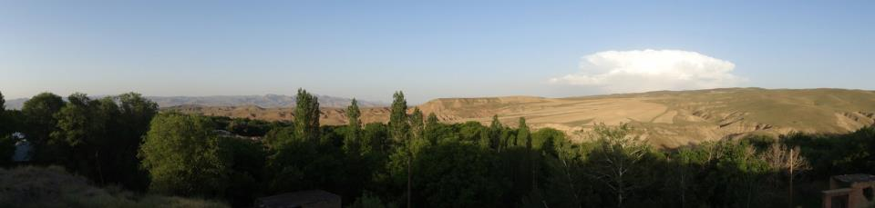 changoreh pic